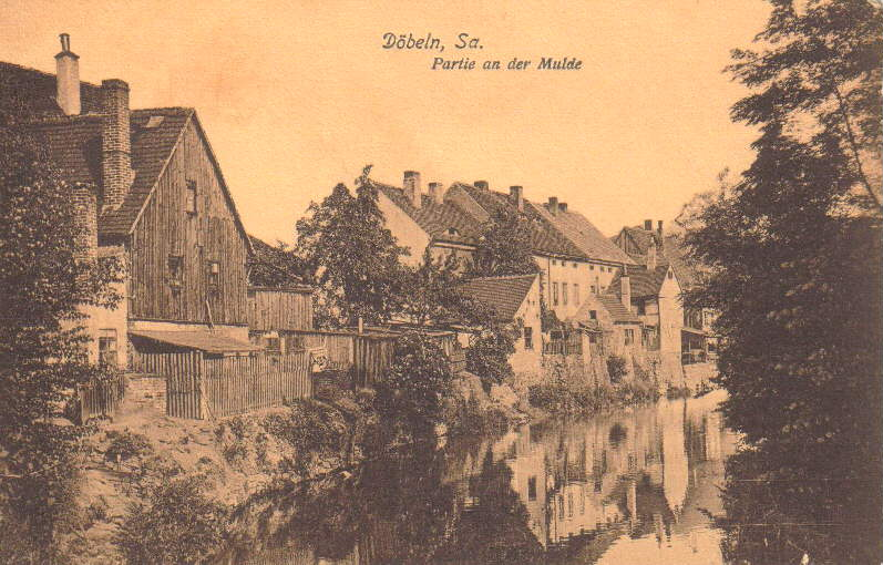 Freiberger Mulde in Döbeln (1908). Verlag: Dr. Trenkler Co., Leipzig, 1908